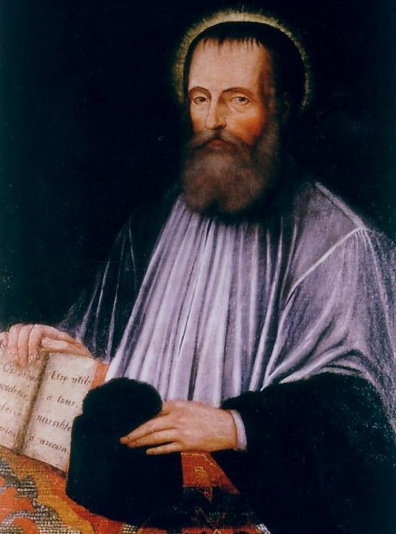 Неизвестный автор. Портрет Пьера Фурье (XVIII век)